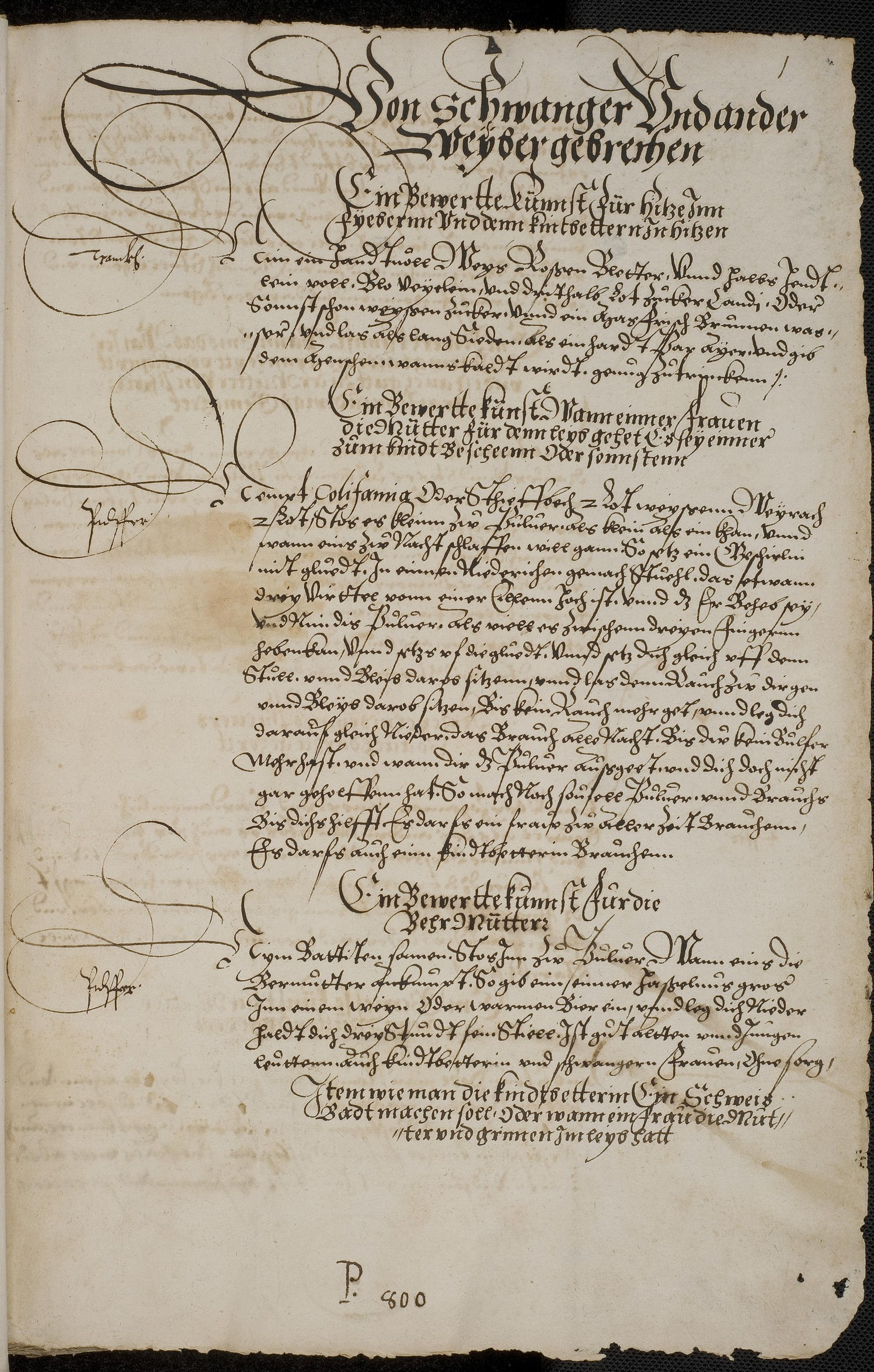 Codex Palatinus germanicus 800, Blatt 1r der Handschrift, "Medizinische Rezeptsammlungen".